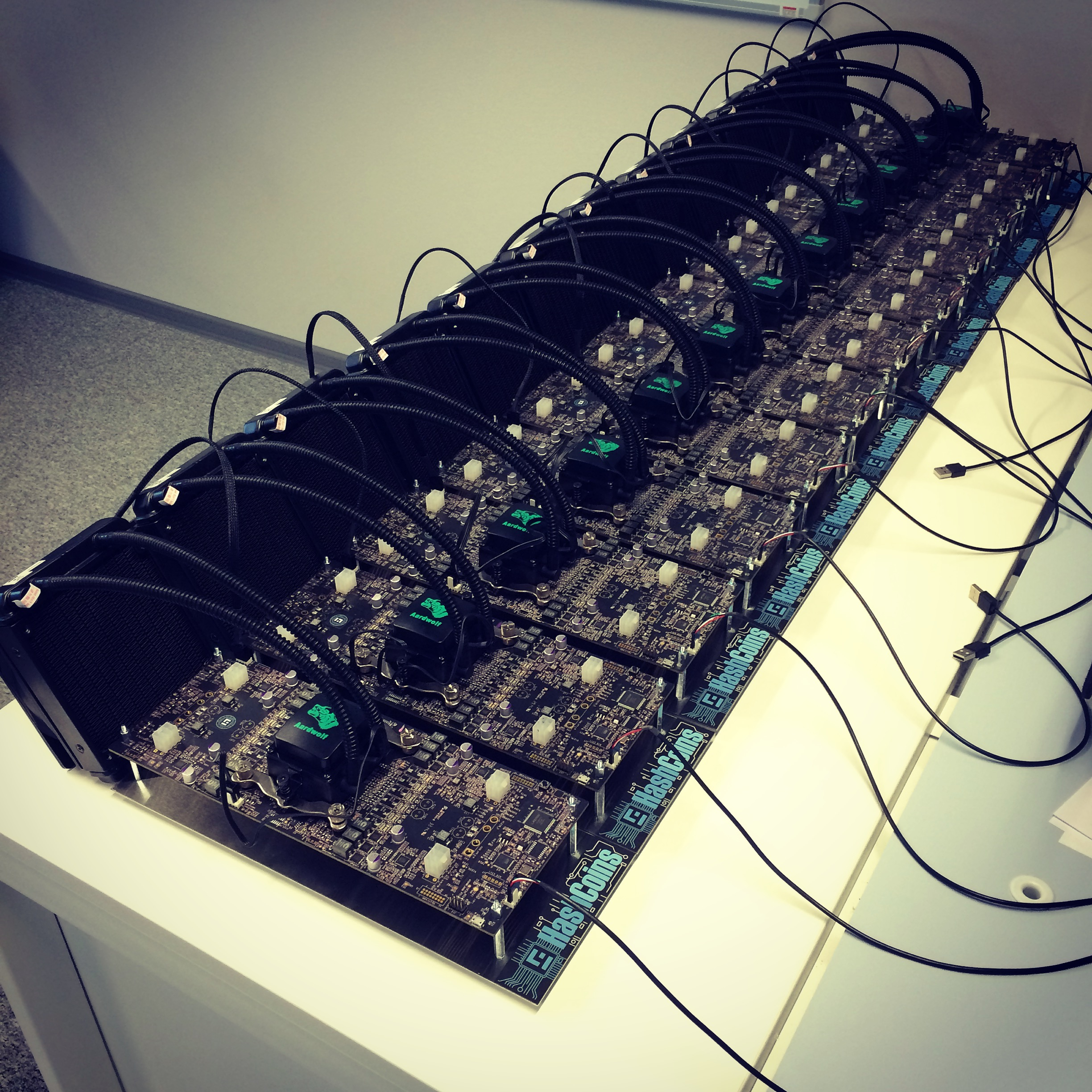 Подготовка к отправке заказа: mining kit на основе чипа Golden Nonce.